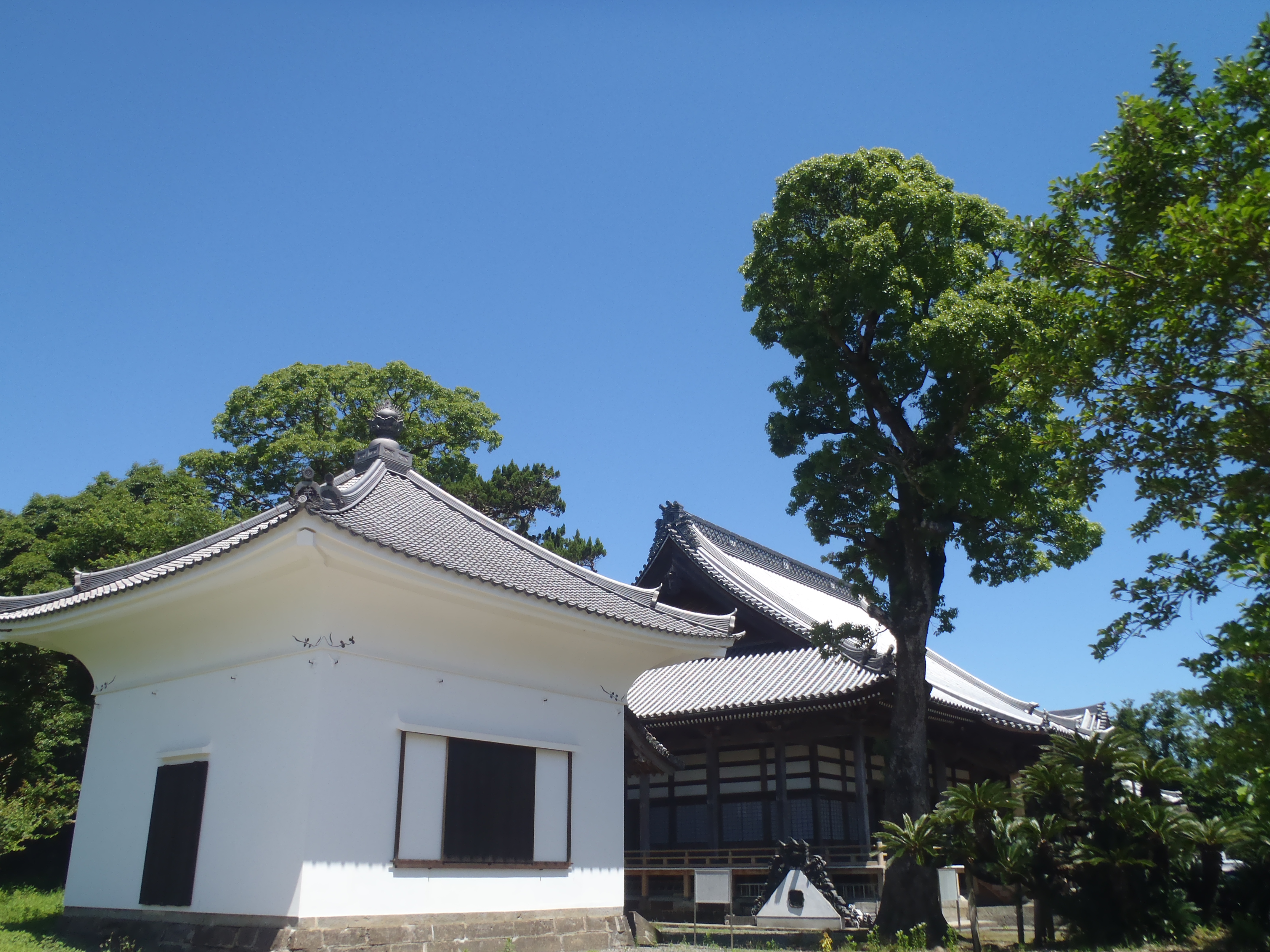 教尊寺経蔵（左）と本堂